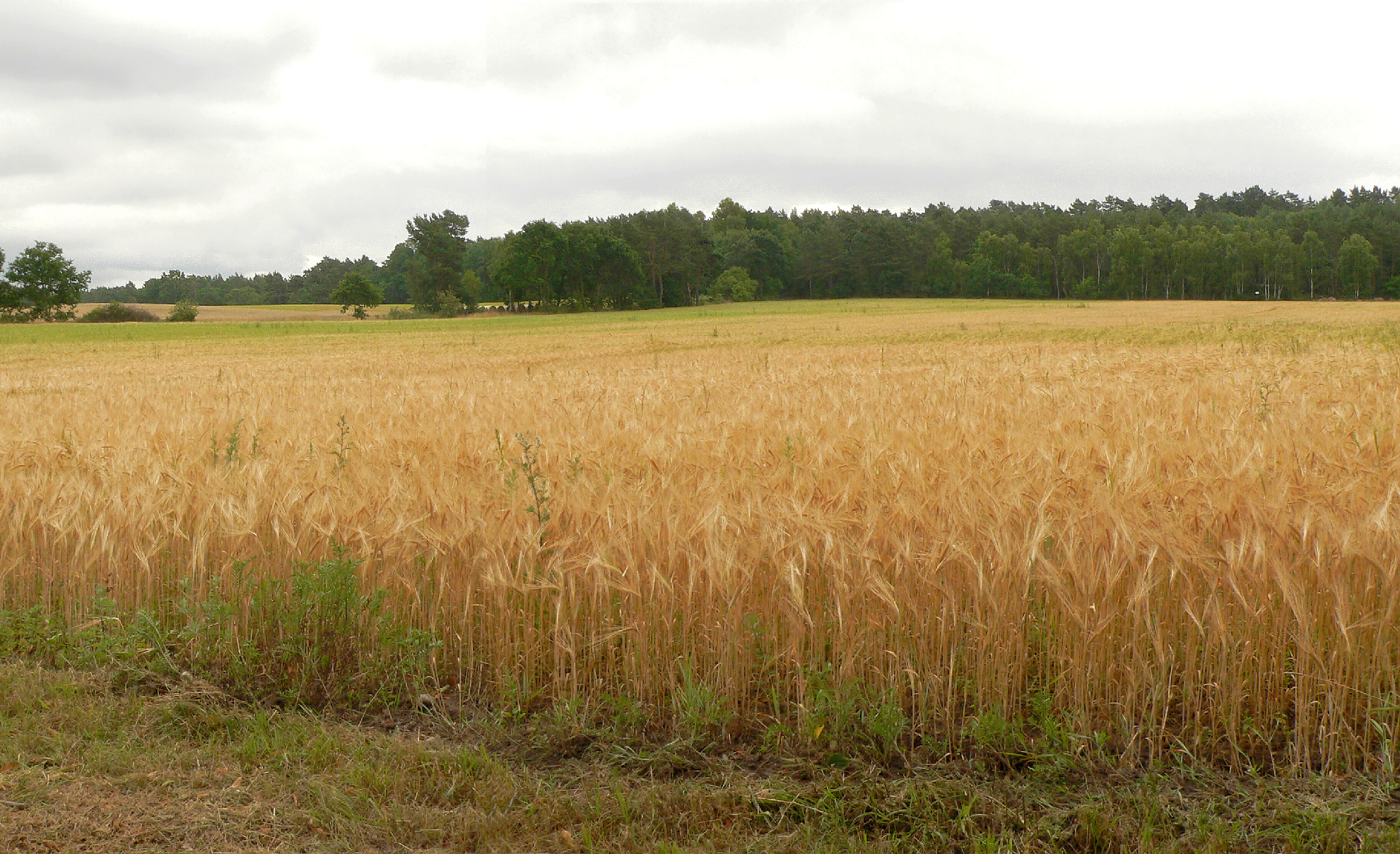 Blick auf den Timeloberges von der Kreisstraße, aufgestellter Gedenkstein zum Gedenken an die Unterzeichnung der Kapitulation am 4. Mai 1945 etwa in Bildmitte